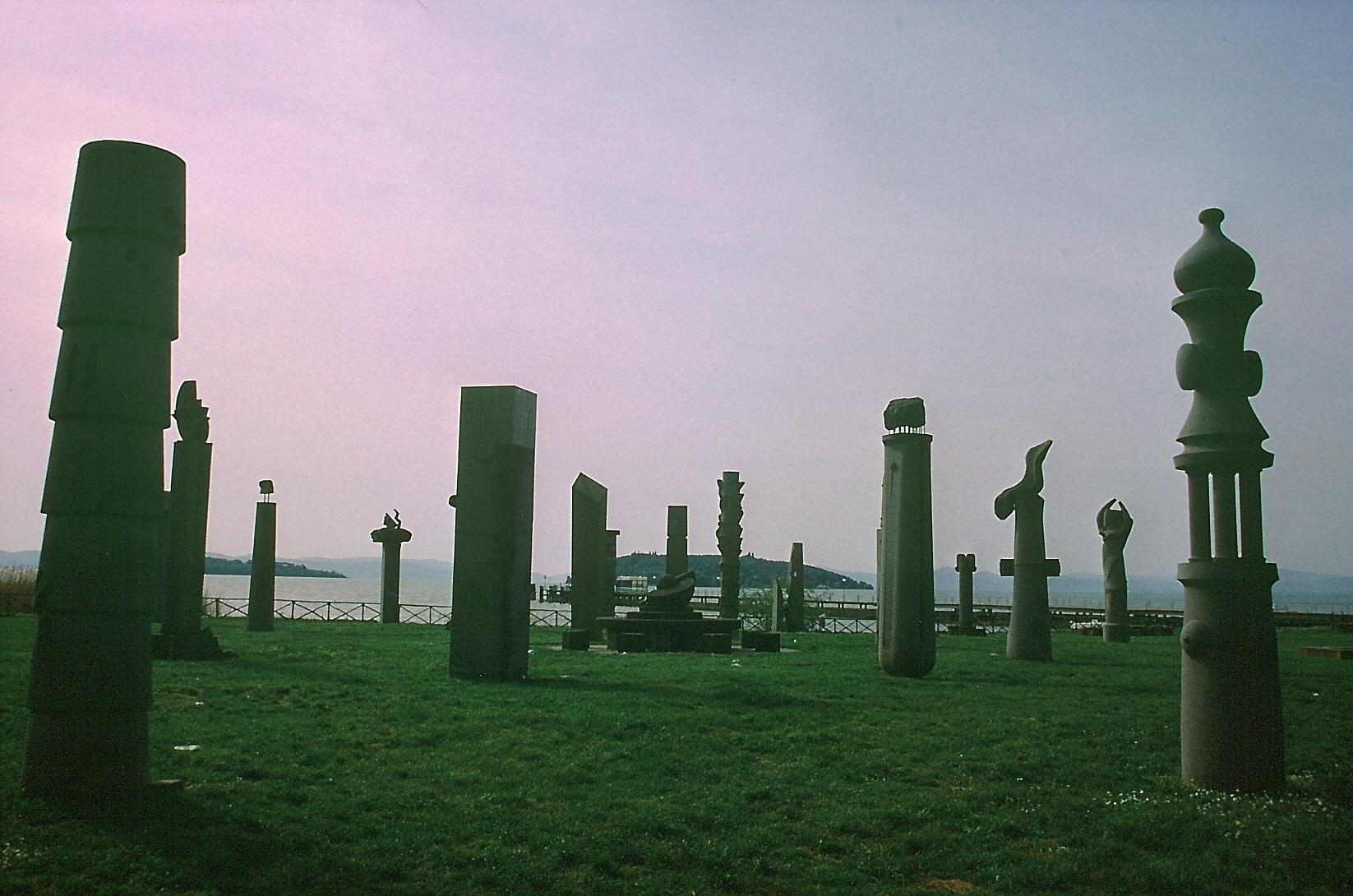 Blick vom Campo del Sole bei Tuoro über den Trasimenischen See mit den Inseln Isola maggiore und Isola minore